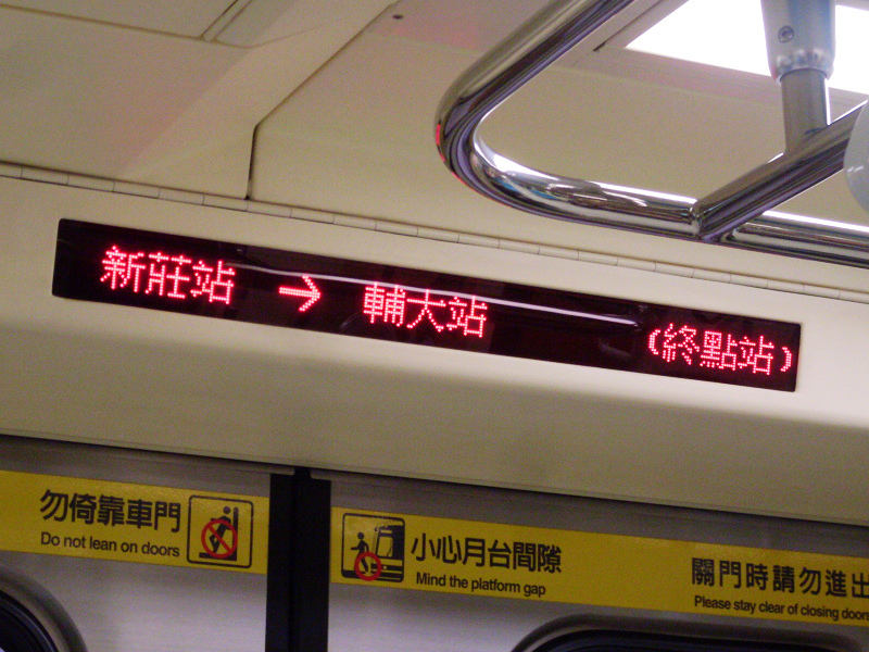 中文（台灣）: 台北捷運新莊線列車往終點站輔大站。